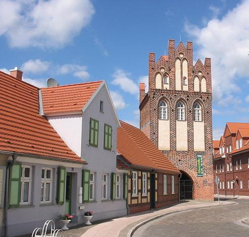 Steintor in Wittenberge, Prignitz, Brandenburg. fotografiert im Juni 2005 von Lienhard Schulz Kategorie:Bild:Torturm